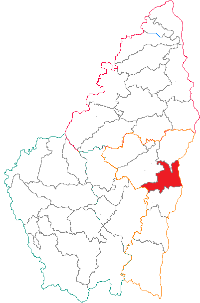 Situation du canton dans le département de l'Ardèche (France)